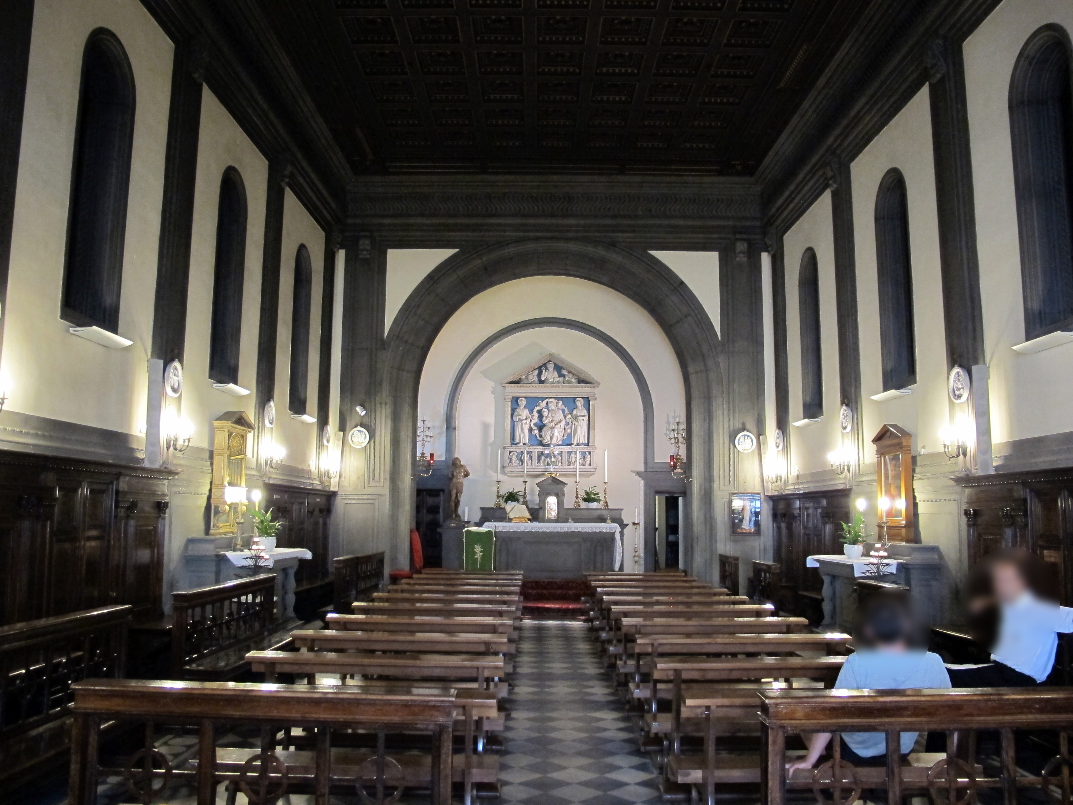 Chiesa della Misericordia, Firenze